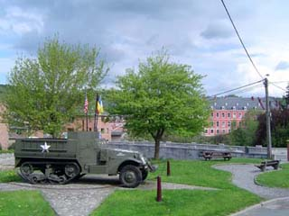 eigen foto 3 mei 2004 Amerikaanse halftrack M3 bij de brug over de Ambleve te Stavelot herinnert aan de gevechten van 18 december 1944 tot 13 januari 1945. De half-track komt uit Frankrijk waar hij gebruikt werd tijdens de landing in Normandie.